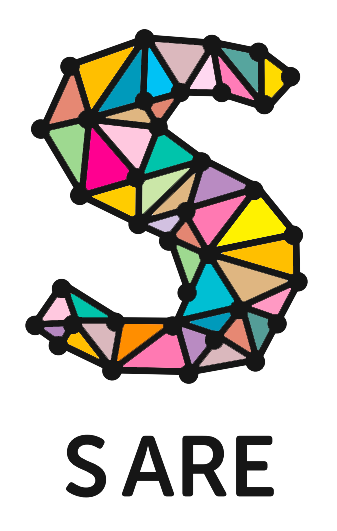 Sare elkartearen logotipoa